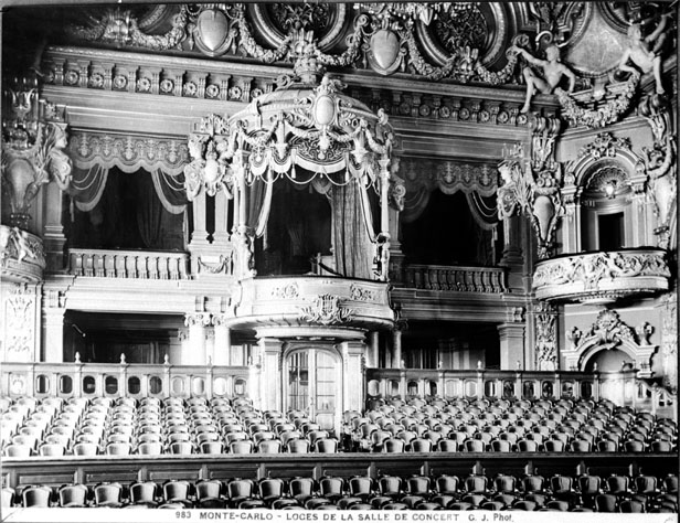 Fonds Trutat - Photographie ancienne Cote : TRU C 1802 Localisation : Fonds ancien (S 30) Original non communicable Titre : Loges de la salle de concert, Monte-Carlo (carte postale) Auteur : Trutat, Eugène Rôle de l’auteur : Photographe Lieu de création : Monte-Carlo (Monaco) Date de création : 1859-1910 [entre] Mesures : : 9 x 12 cm Observations : Note manuscrite de Trutat : " Monte-Carlo : salle de spectacle ". Mot(s)-clé(s) : -- Théâtre -- Loge -- Intérieur -- Balustrade -- Balcon -- Dais architectural -- Baldaquin -- Fauteuil -- Décor d'ameublement -- Décor d'architecture -- Sculpture -- Rideau -- Ornement -- Opéra -- Monte-Carlo (Monaco) -- Monaco (Principauté de) -- Casino (Monte-Carlo) -- Salle Garnier (Opéra de Monte-Carlo) -- 19e siècle, 2e moitié -- 20e siècle, 1e quart Médium : Photographies -- Négatifs sur plaque de verre -- Noir et blanc -- Scènes d'intérieur -- Reproductions d'oeuvre d'art Voir : TRU C 1800 Loges de la salle de concert, Monte-Carlo (carte TRU C 1804 Scène de la salle de théâtre, Monte-Carlo (carte Bibliothèque de Toulouse. Domaine public